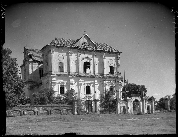 Беларуская (тарашкевіца): Любяшоў (Lubiašoŭ), пляц Рынак (plac Rynak). Касьцёл і калегіюм піяраў